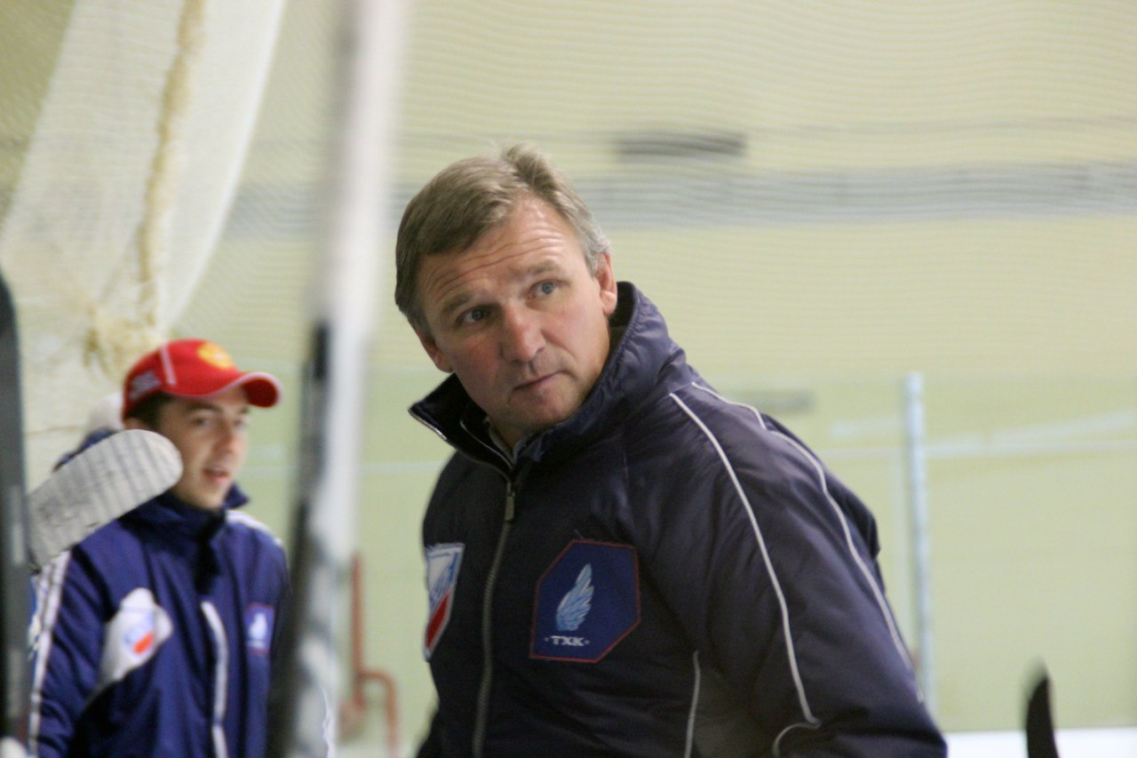 Ждахин, Алексей Геннадьевич